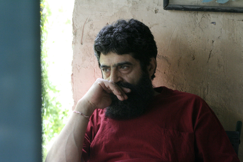 Bahram Dabiri, Iranian painter.